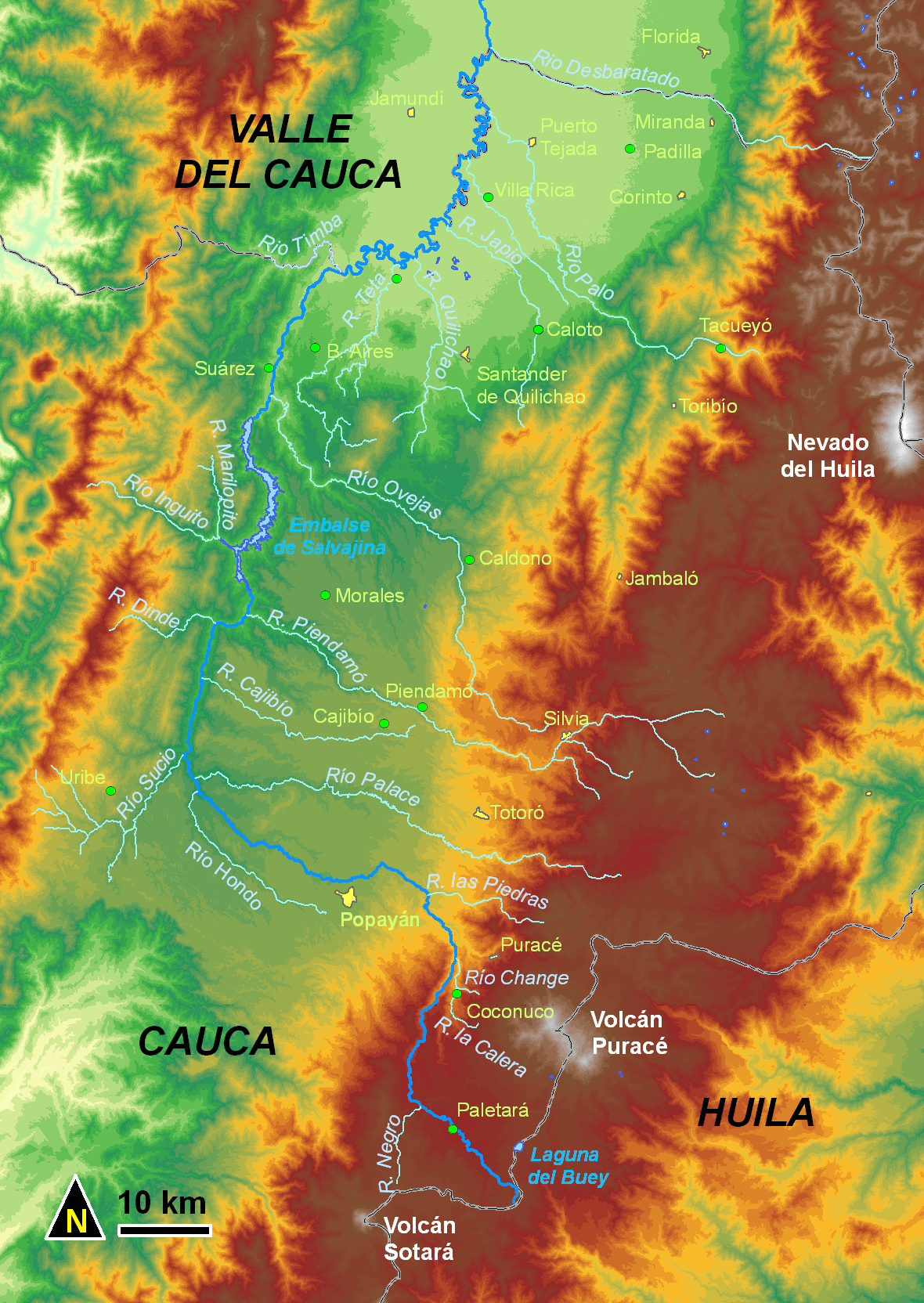 Rio Cauca en el Departamento del Cauca, Colombia